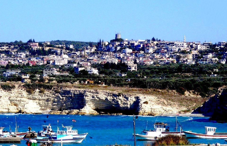 sulayıp türkmen صليب التركمان